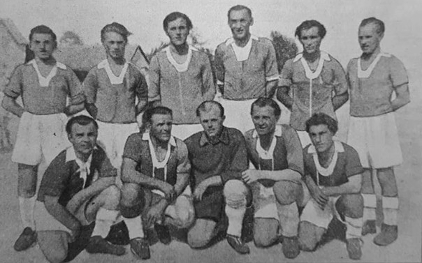 Die Elf um 1950